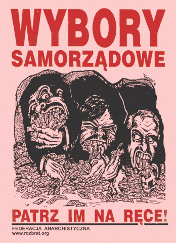 Zdjęcie ze strony skłotu Rozbrat. Za zgodą kolektywu.